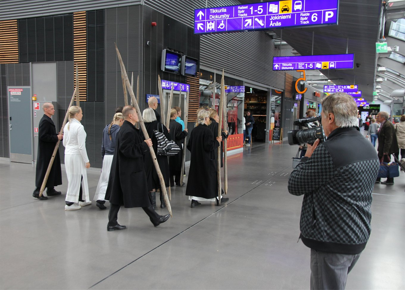 Elokuvaohjaaja Jean Bitar Tikkurilan rautatieasemalla vantaalla elokuussa 2017.